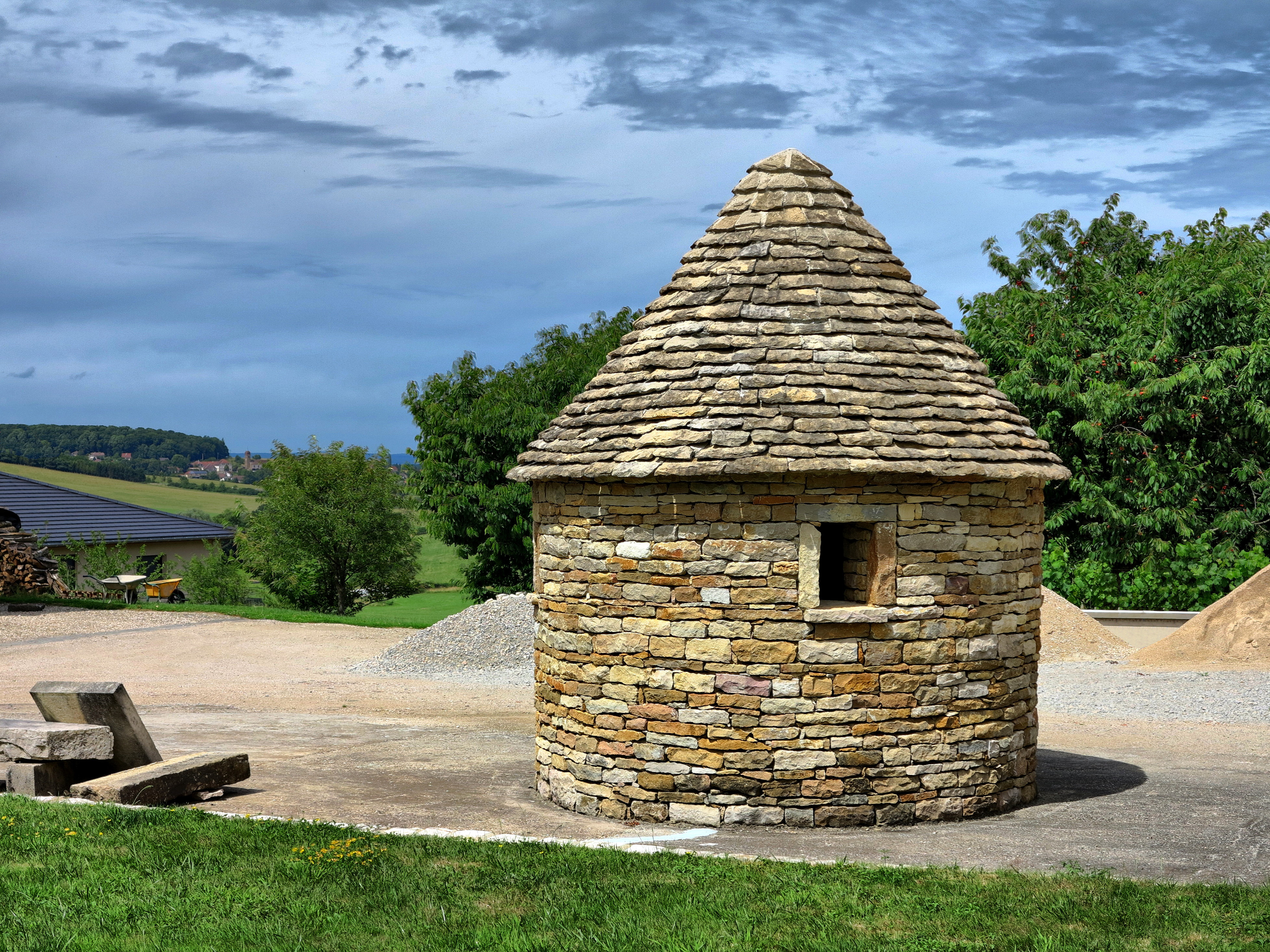 La caborde